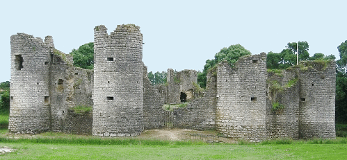 commequiers